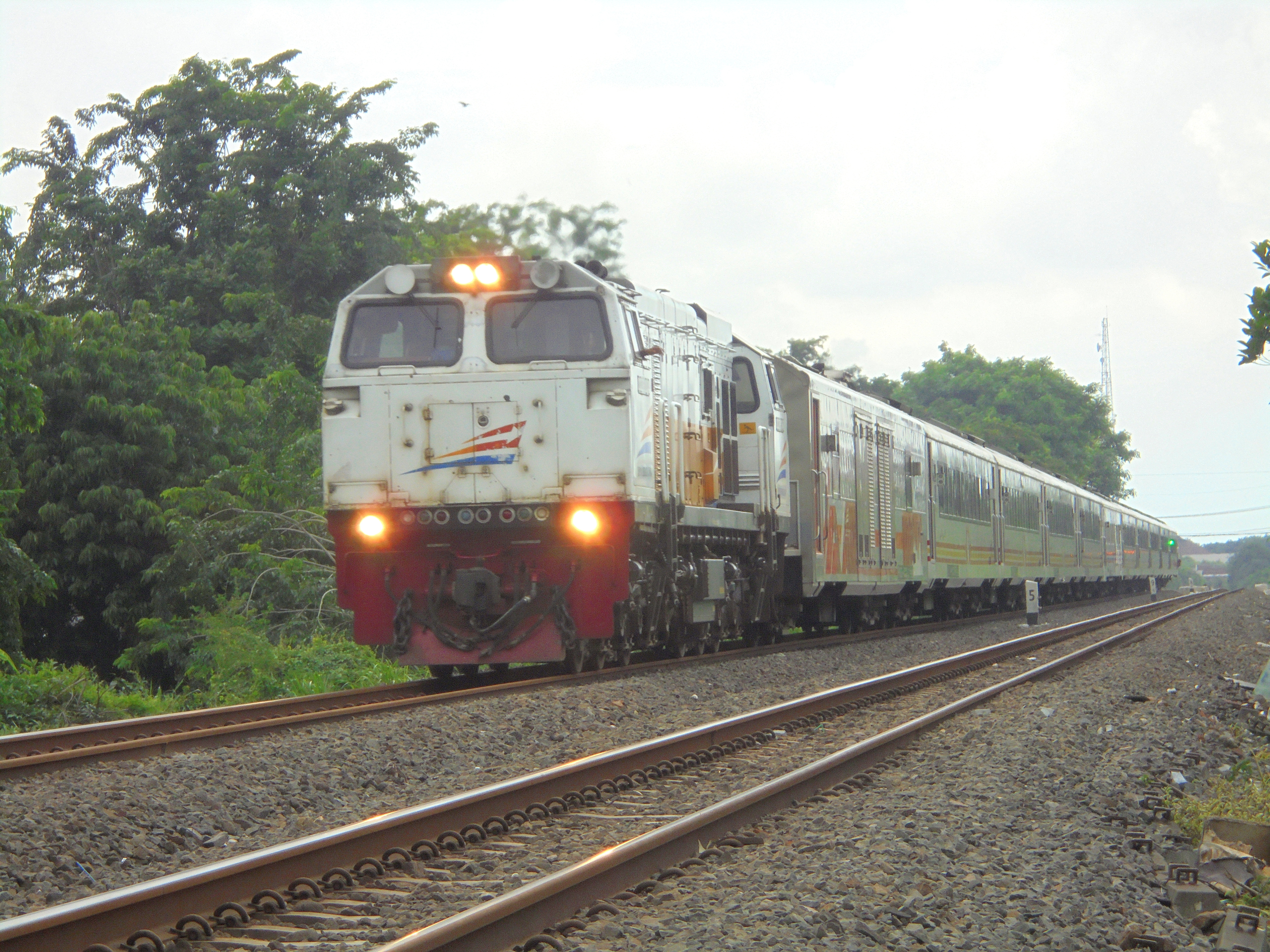 Kereta api Jayakarta saat melintas di Ngagel, Wonokromo, Surabaya